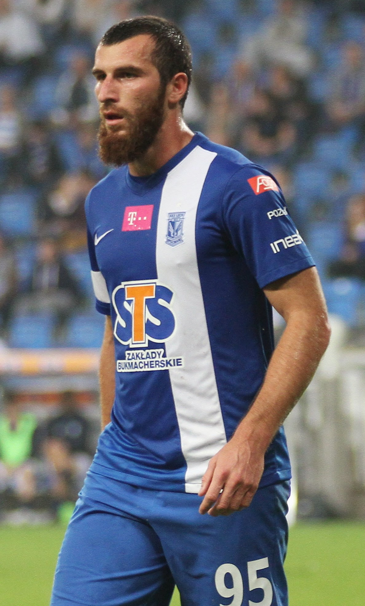 Zaur Sadajew w barwach Lecha Poznań